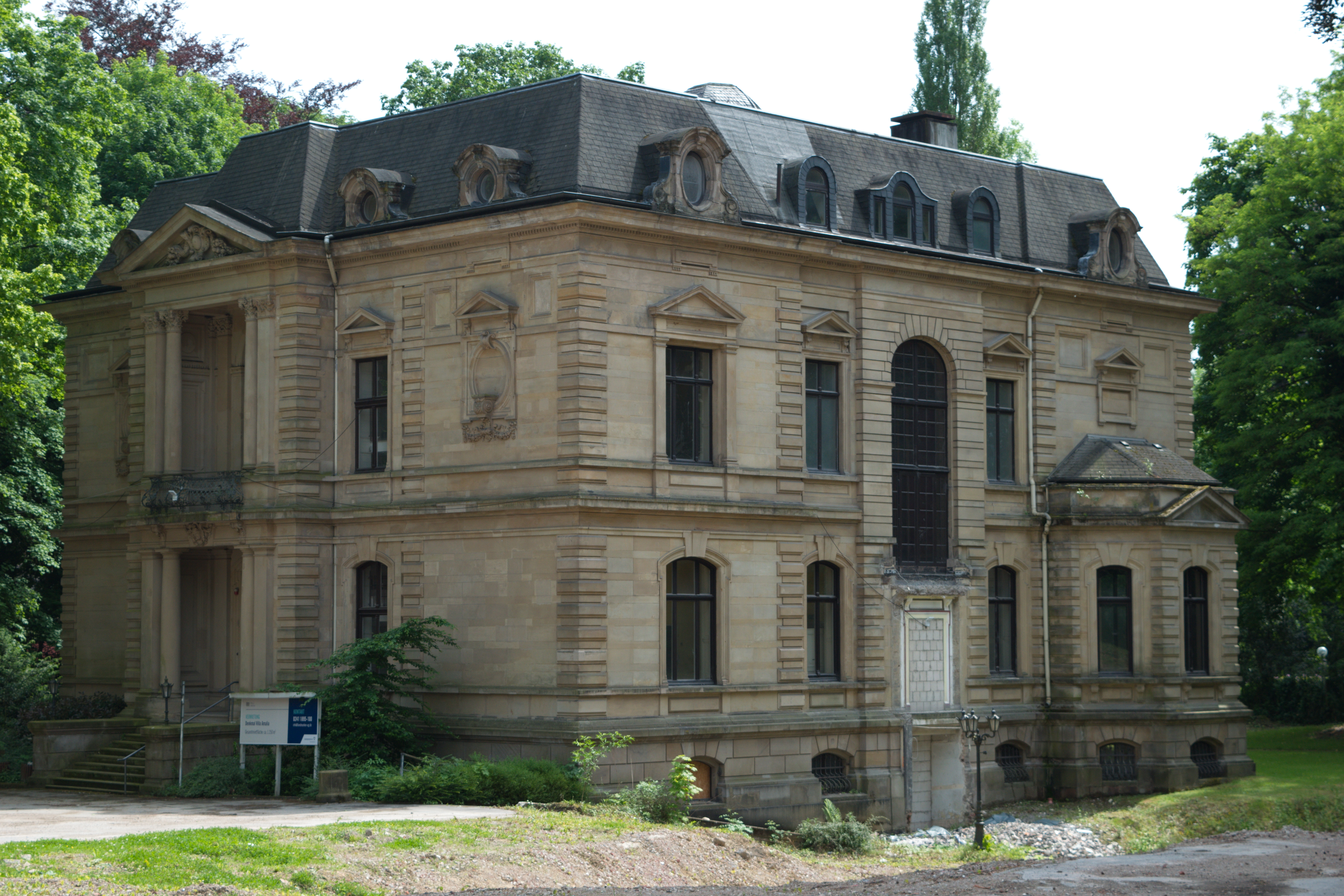 Briller Straße, Wuppertal